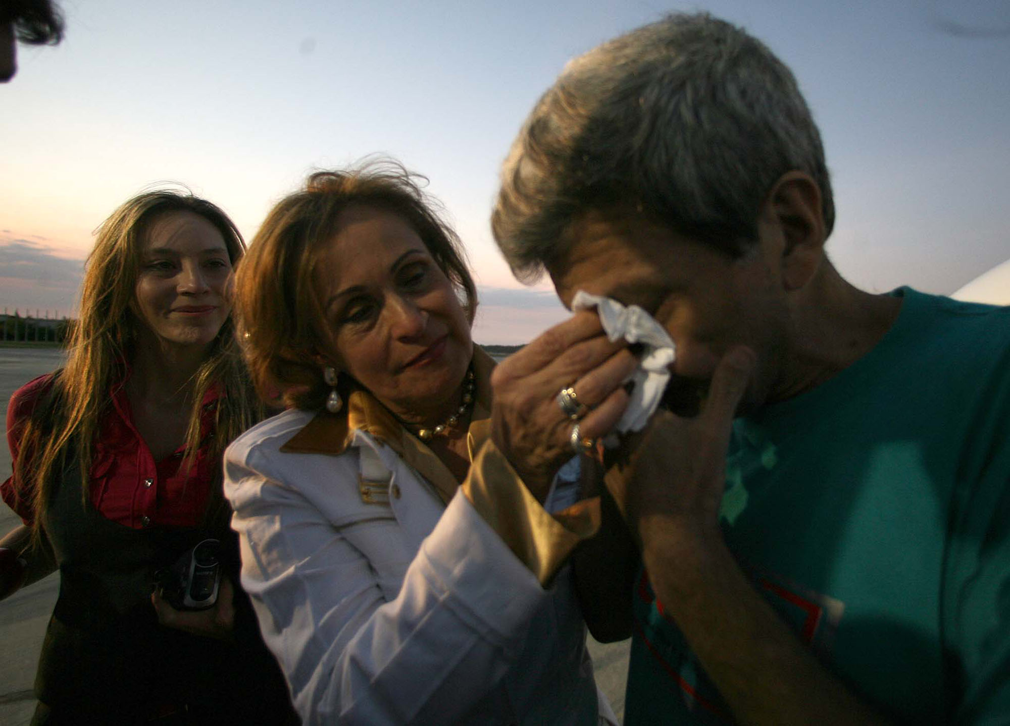 El ex congresista Jorge Géchem liberado por las Fuerzas Armadas Revolucionarias de Colombia (FARC), se encontró con su familia después de años de separación, en el Aeropuerto Internacional Simón Bolívar en Maiquetía.